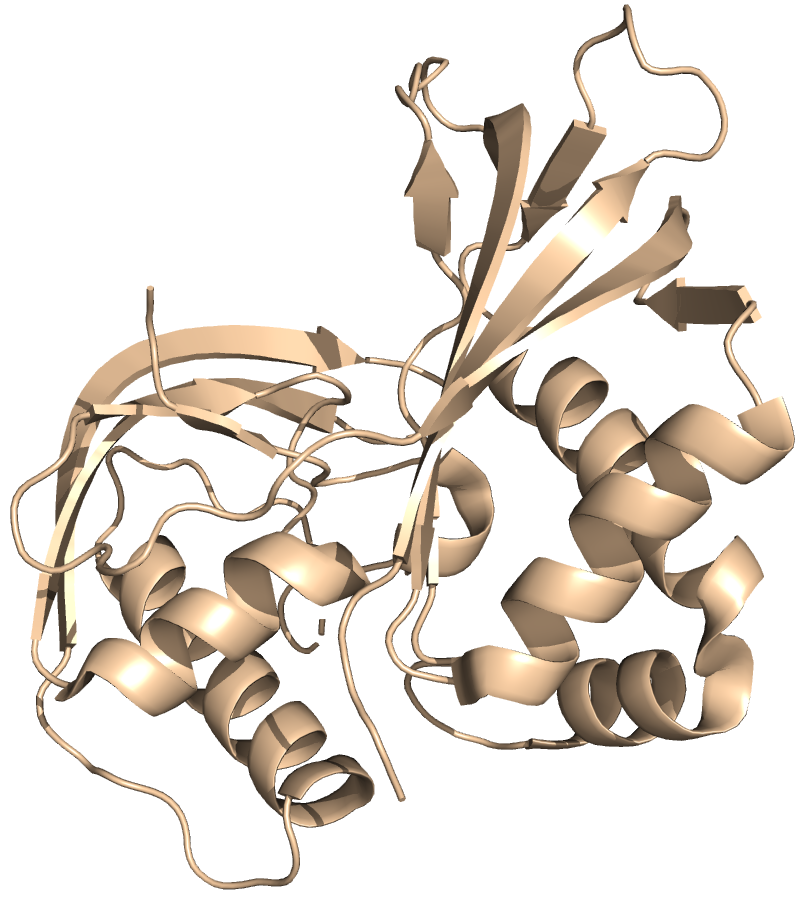 Estructura cristal·lina de la proteïna Cas6 de Pyrococcus furiosus. Imatge obtinguda a partir de la seqüència d'aminoàcids del PDB tractada amb el software PyMol.